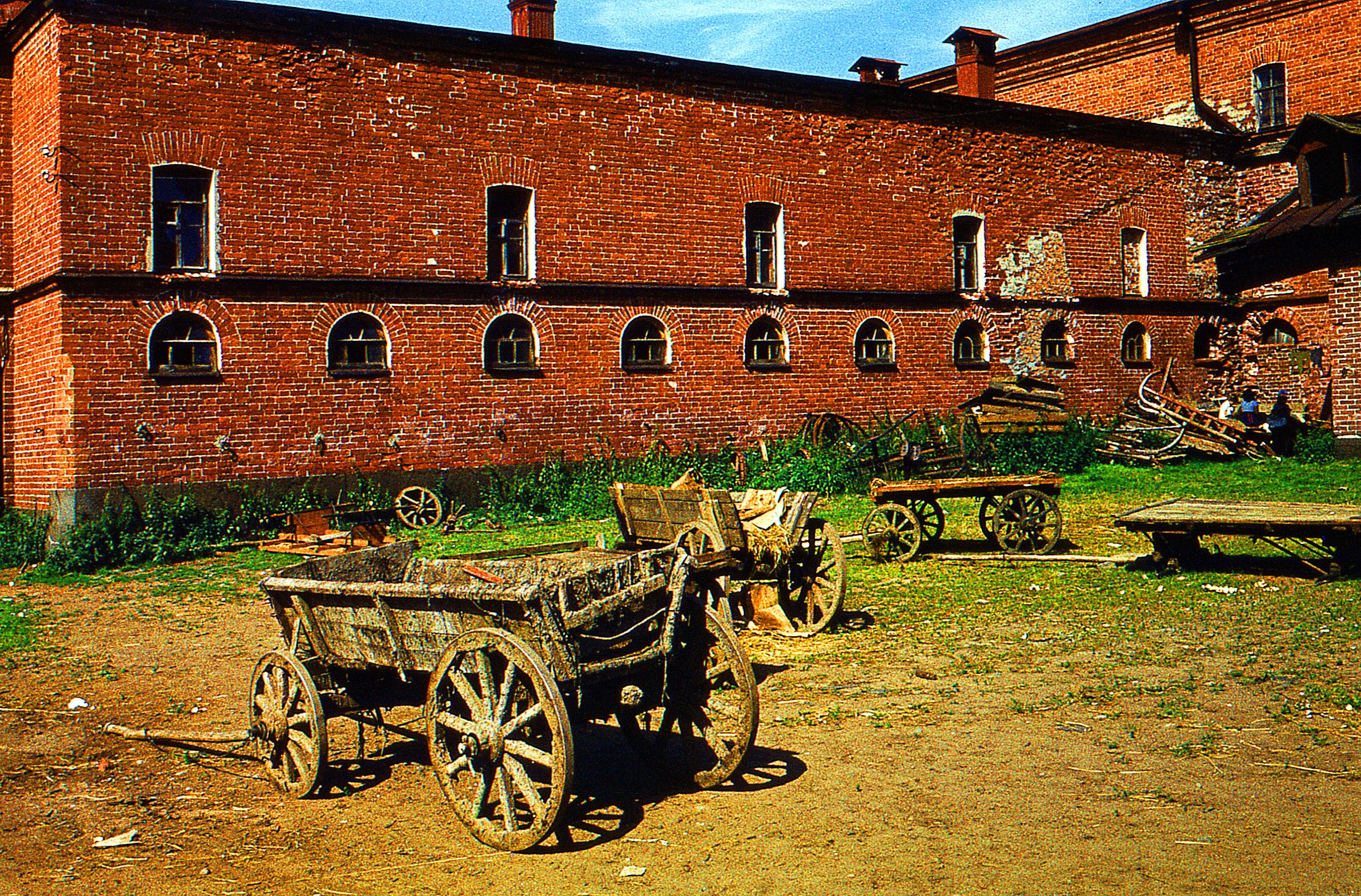 Телега. Хозяйственный двор монастыря.Валаам.